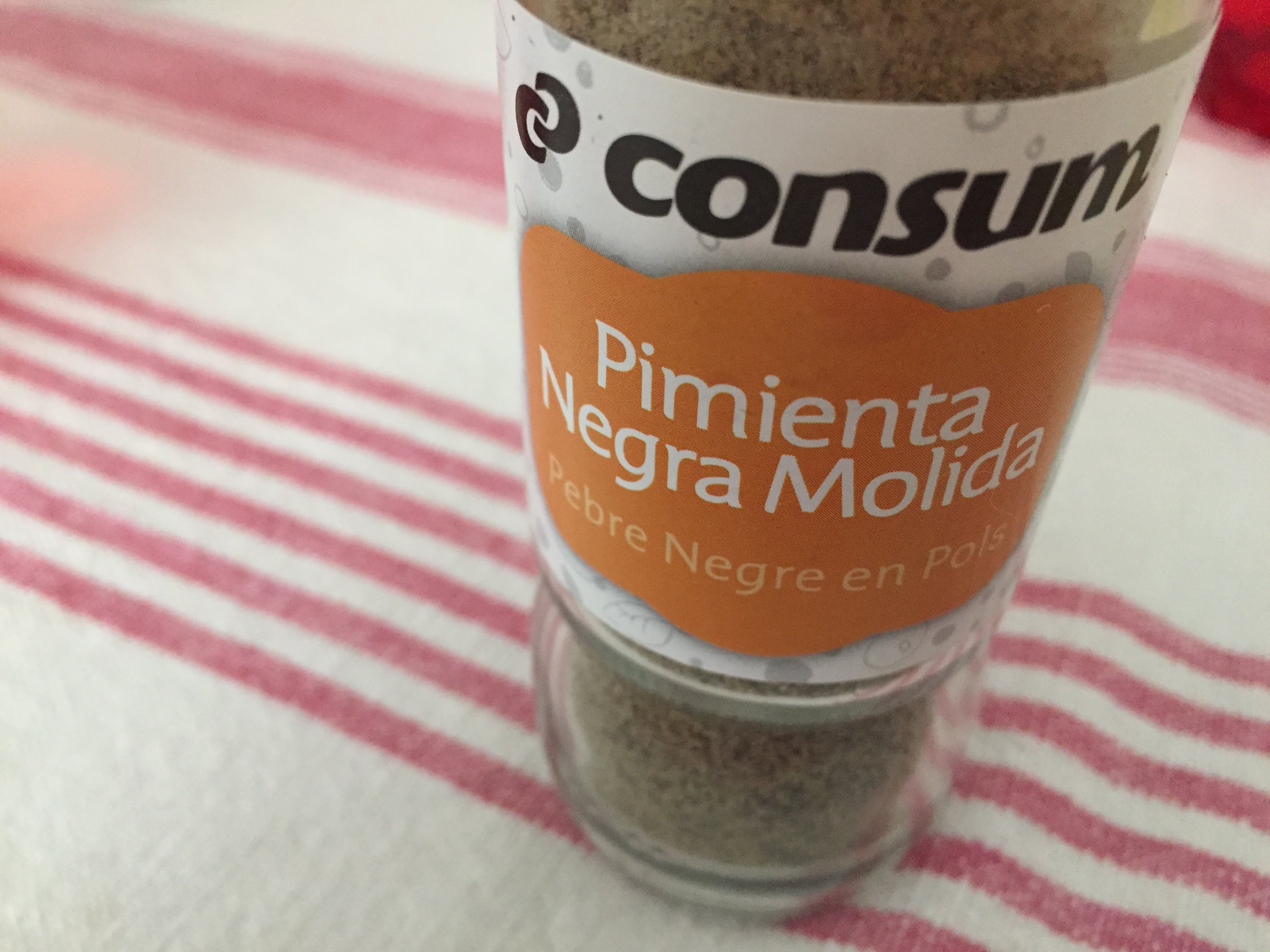 "Pimienta negra molida. Bilingüisme a productes de Consum"